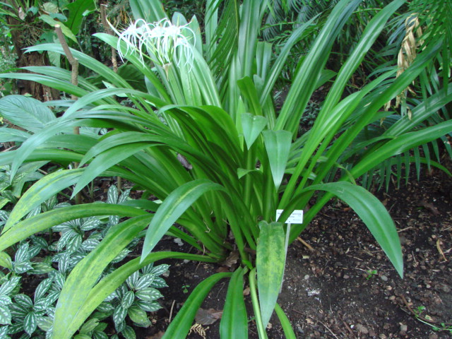 Jardin botanique de l'Université de Zurich (Suisse) : Hymenocallis speciosa Salisb.